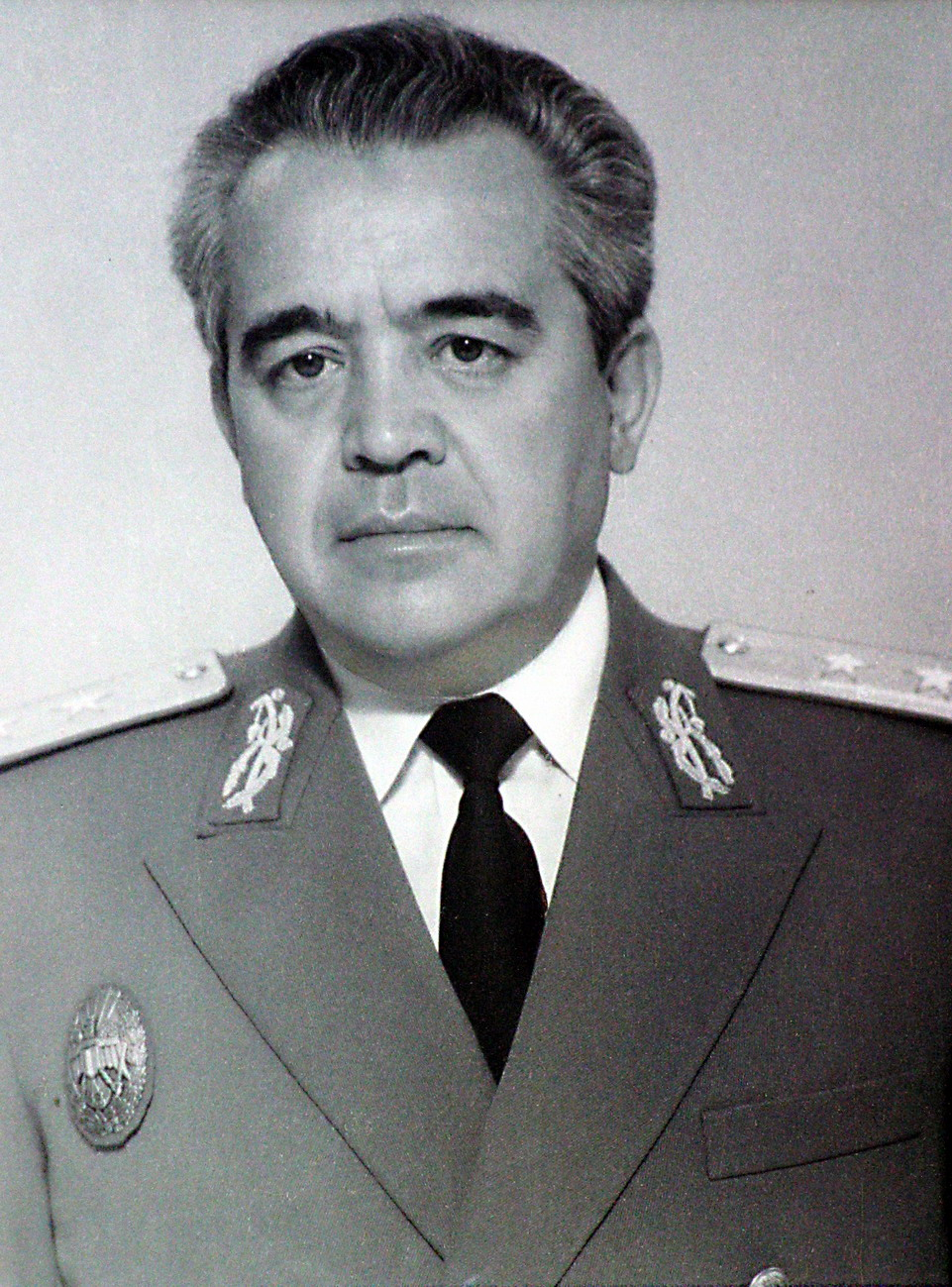 Generalul Niculae Spiroiu.